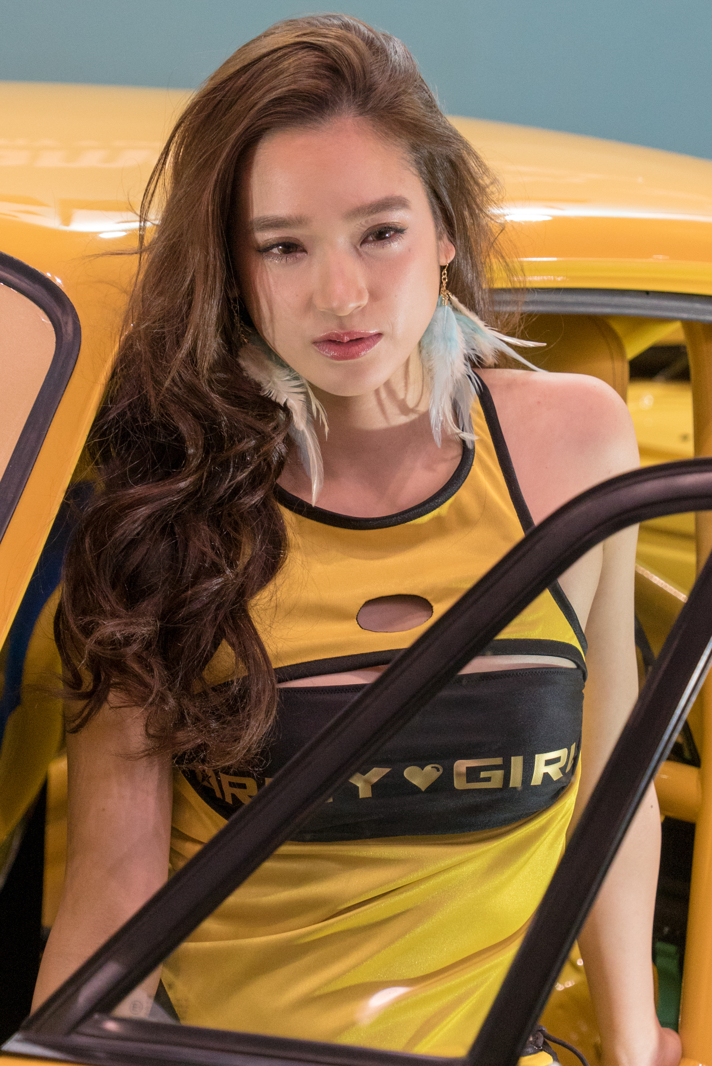 TOKYO AUTO SALON 2018-19.jpg